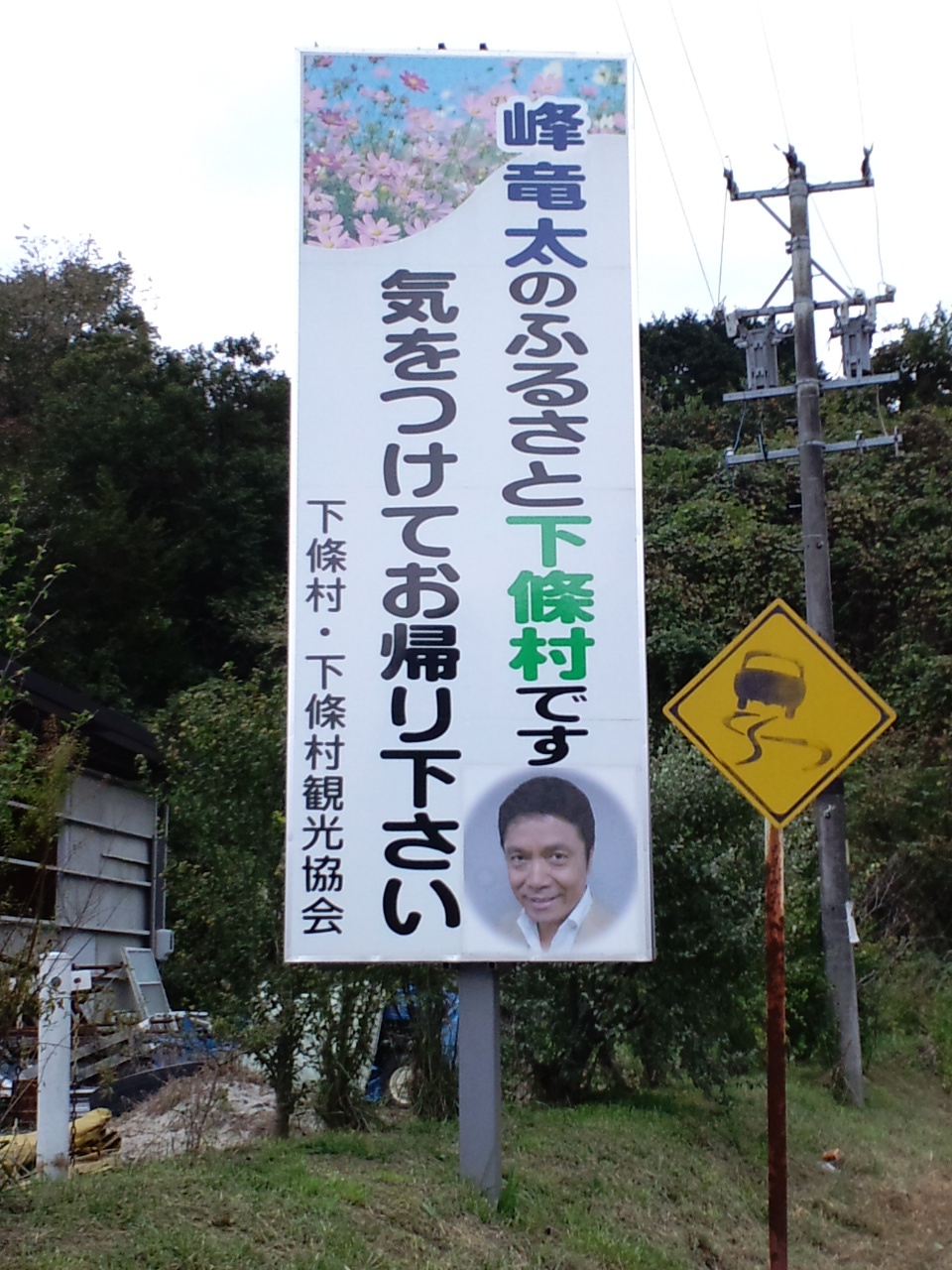 村の出口。 下條村の名産品は峰竜太。